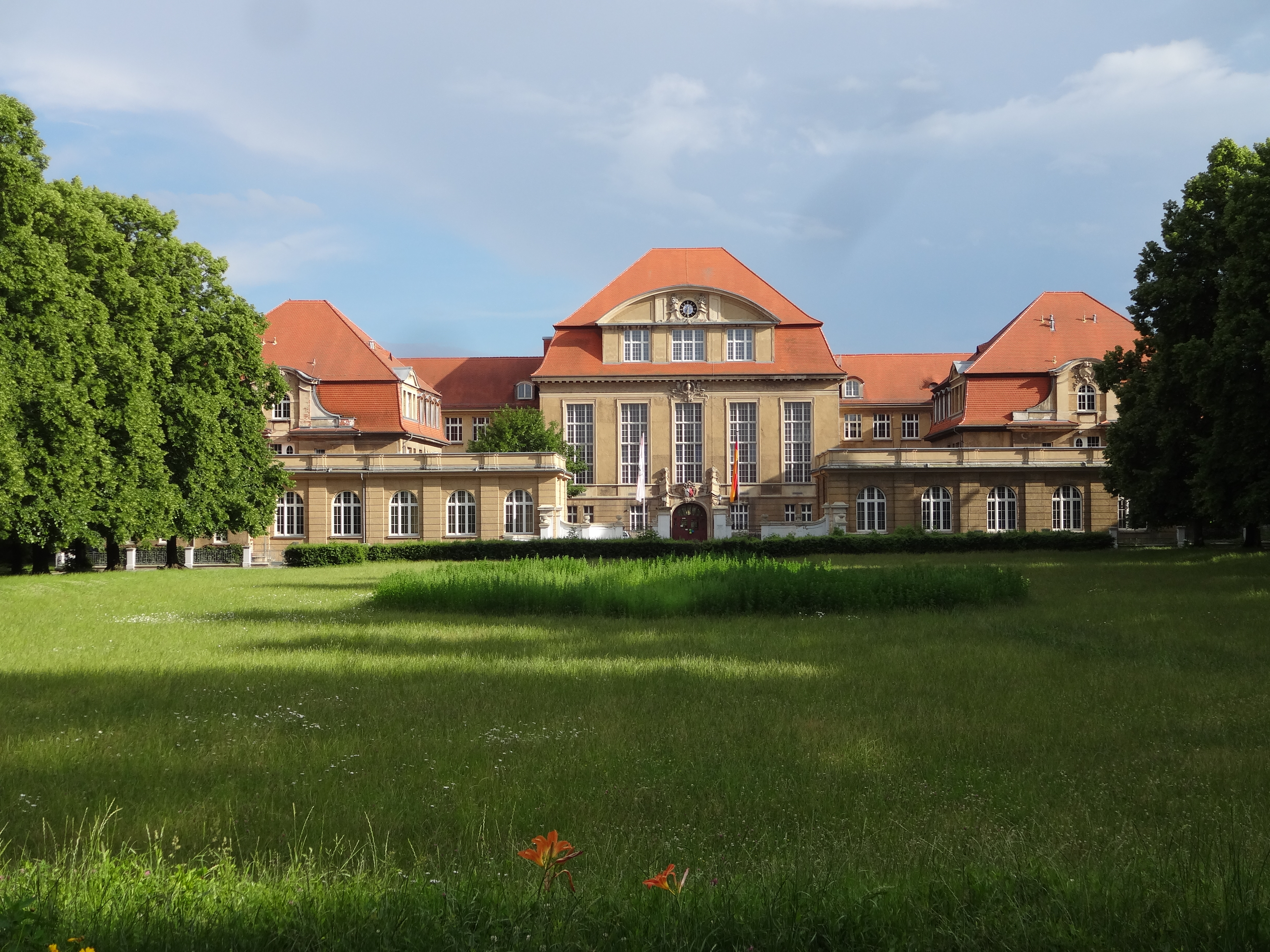 Käthe-Kollwitz-Gymnasium in Halberstadt (Sachsen-Anhalt), Käthe-Kollwitz-Platz; erbaut 1912 als Höhere Mädchenschule Halberstadt mit Lehrerinnenseminar; unter Denkmalschutz